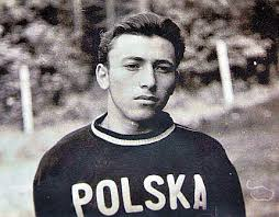 טוביה במדי נבחרת פולין